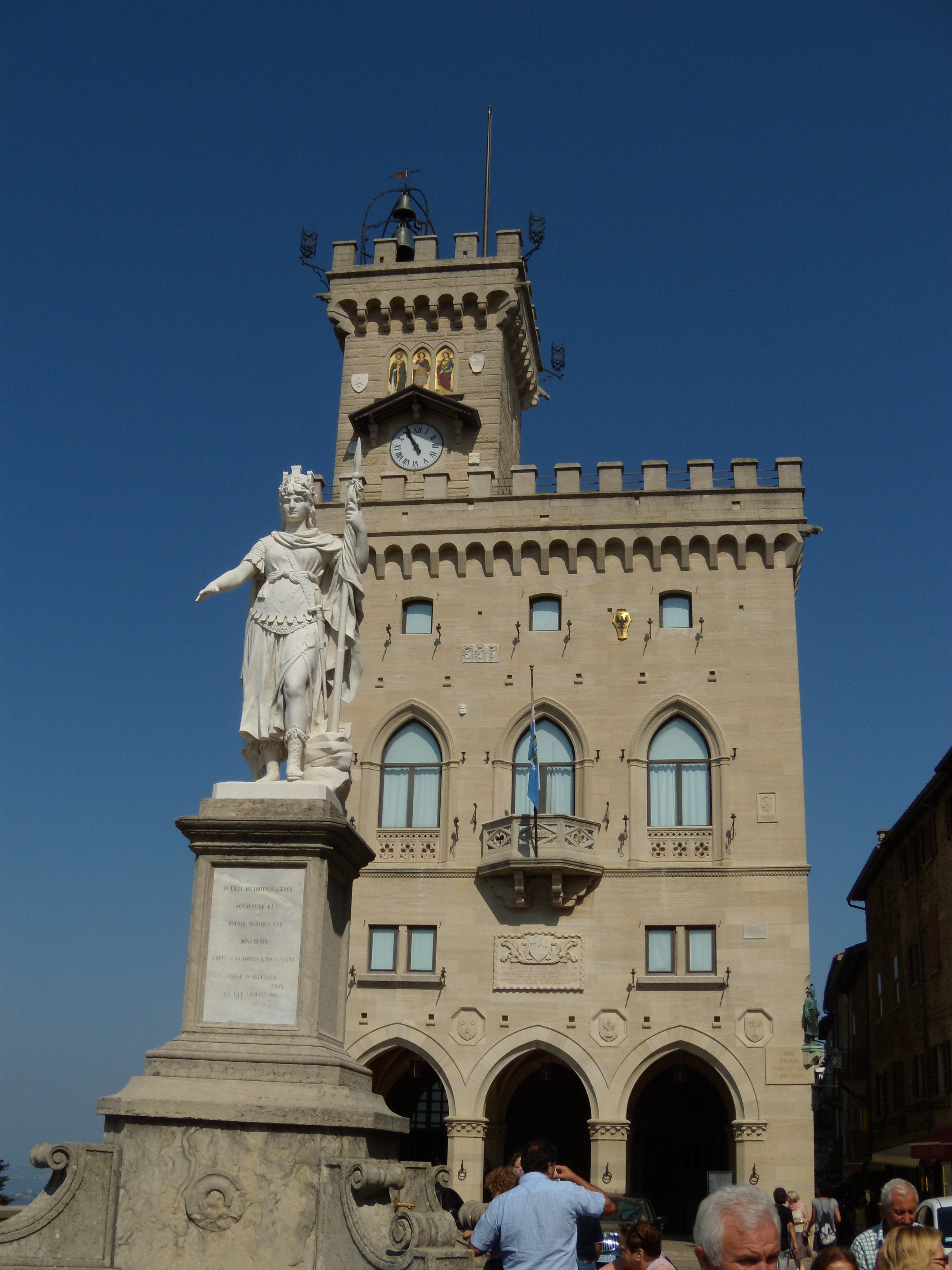 Scorcio del Palazzo Pubblico della Repubblica di San Marino.